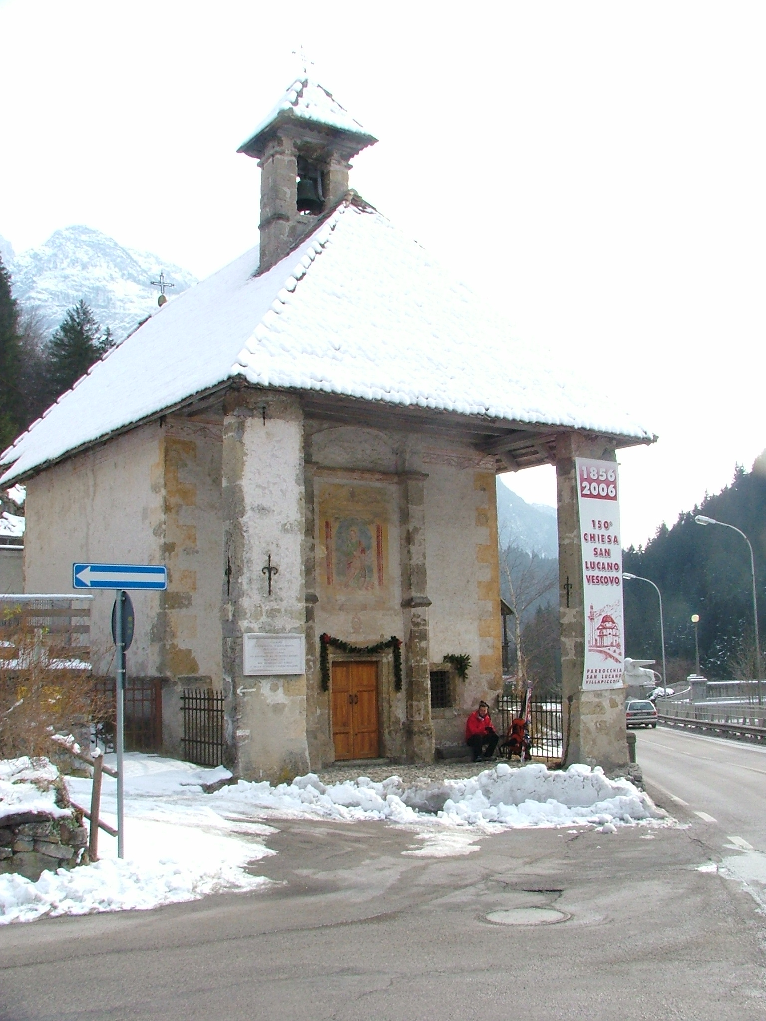 Chiesa di Santa Caterina di Alessandria, Auronzo di Cadore, Belluno